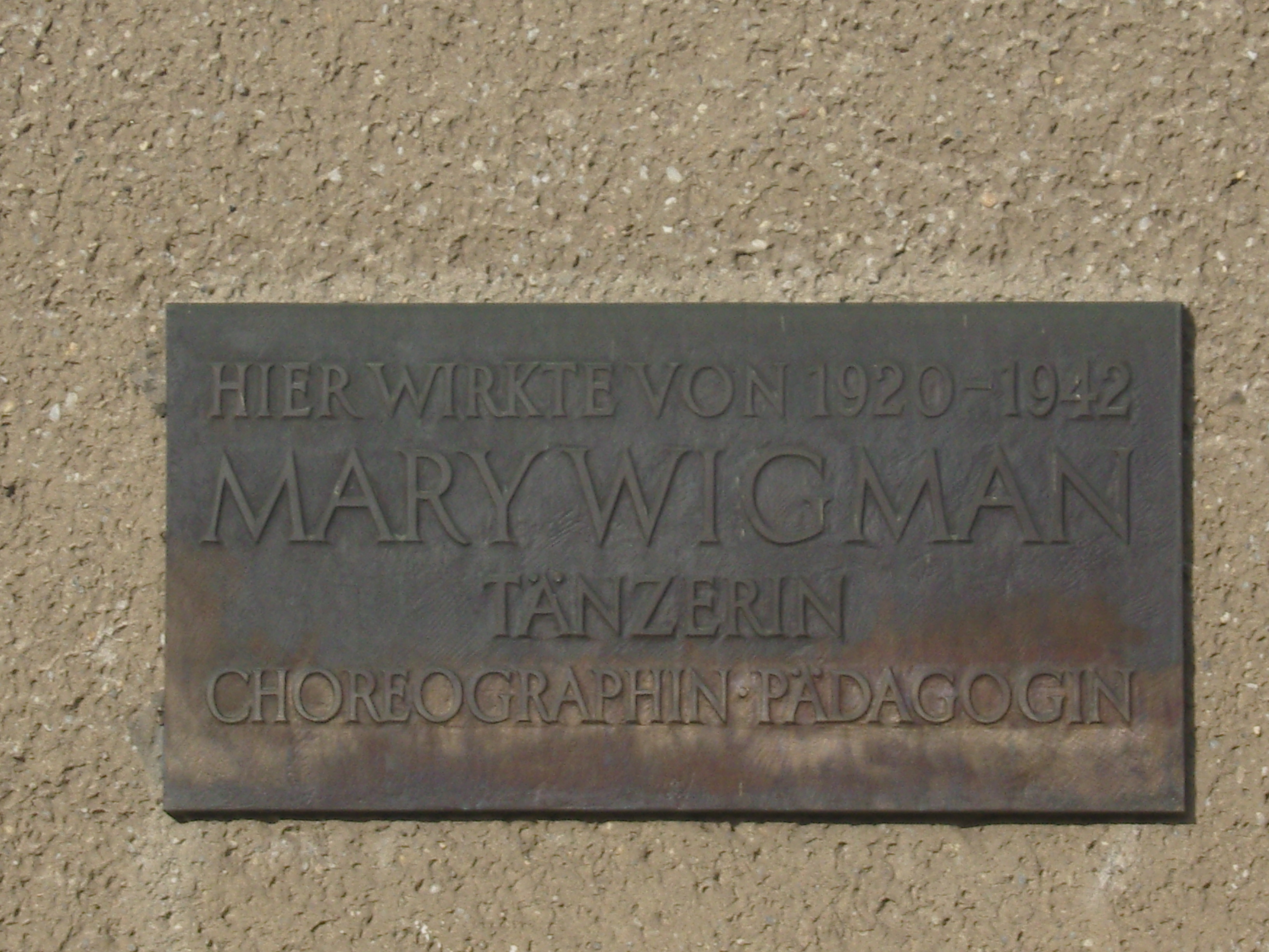 Gedenktafel für Mary Wigman am Haus der Kleine Szene in der Bautzner Straße, Dresden